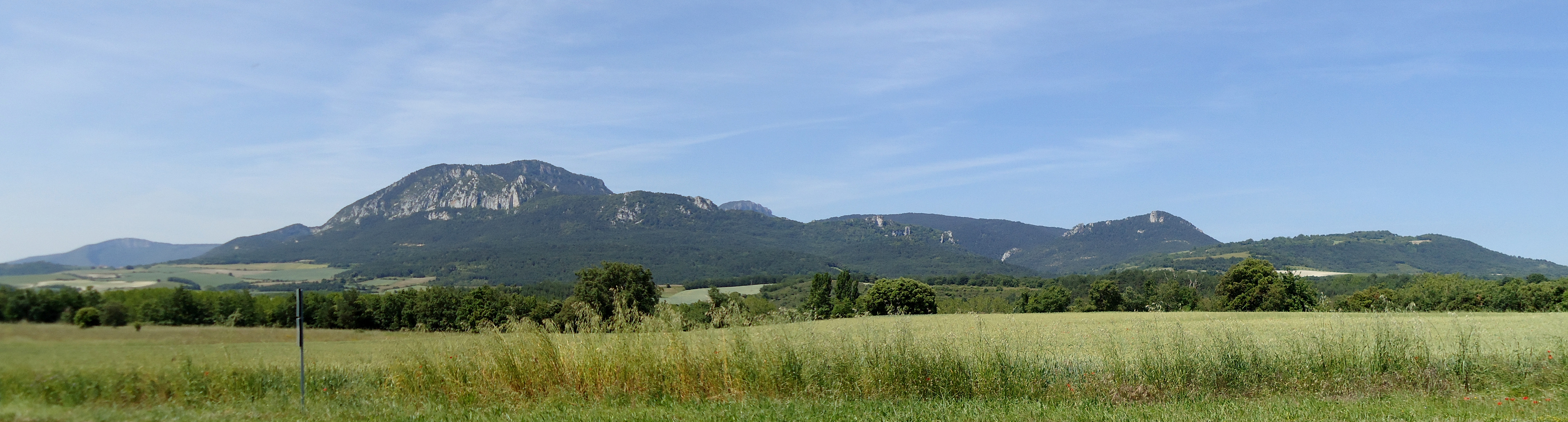 Bachicabo mendia, ezkerrean